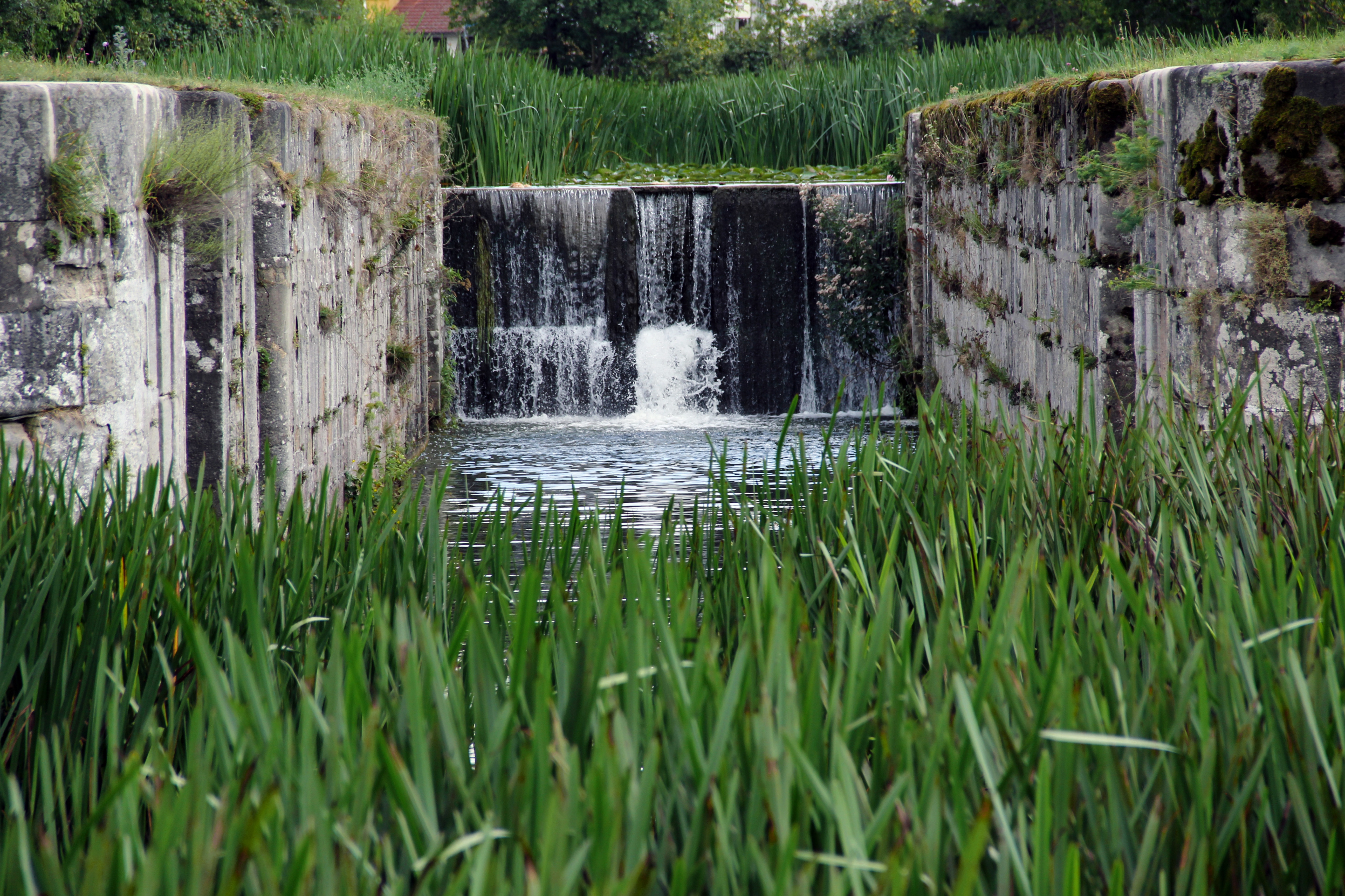 Schleuse 39, Ludwig-Donau-Main-Kanal